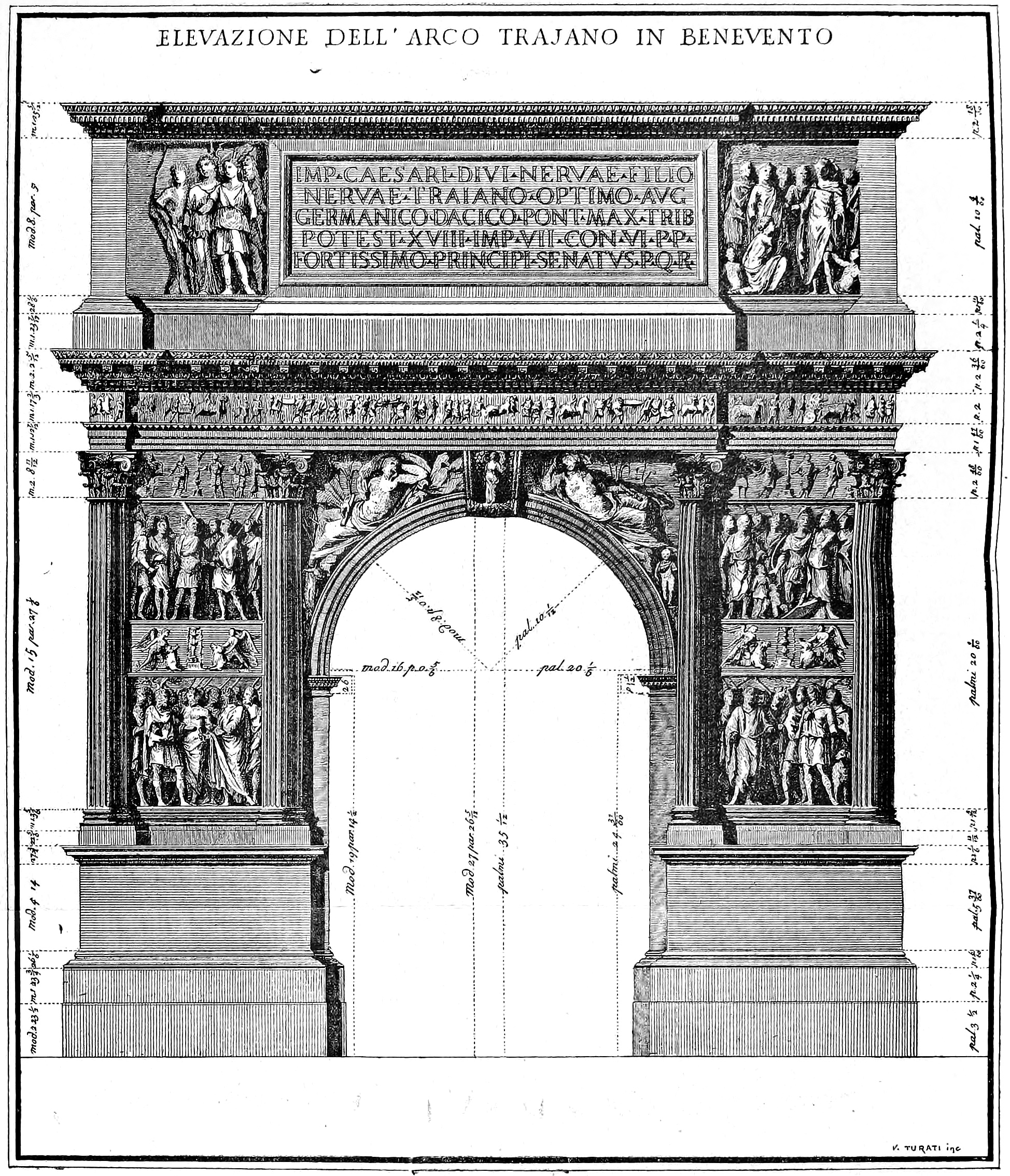 Illustrazioni da I monumenti e le opere d'arte della città di Benevento: lavoro storico, artistico, critico, di Almerico Meomartini, Tipografia di L. de Martini e figlio, Benevento, 1889